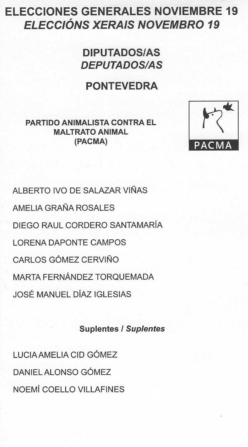 Papeleta electoral para o Congreso dos Deputados - Eleccións Xerais de España de novembro de 2019, Circunscrición electoral de Pontevedra